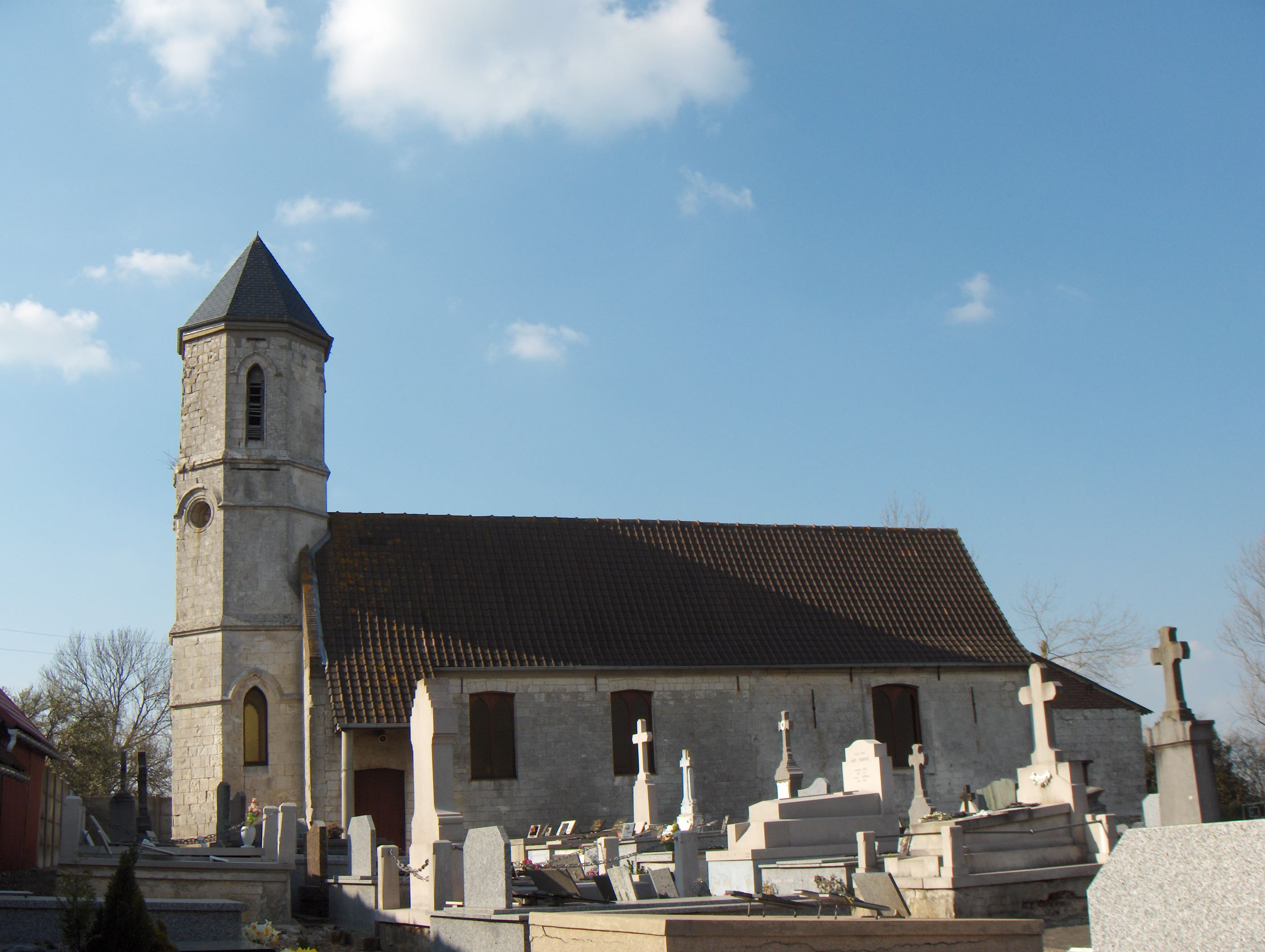 Saint-Pierre, Ortsteil der Gemeinde Wismes (Frankreich, Dept. Pas-de-Calais), 17. Jh.